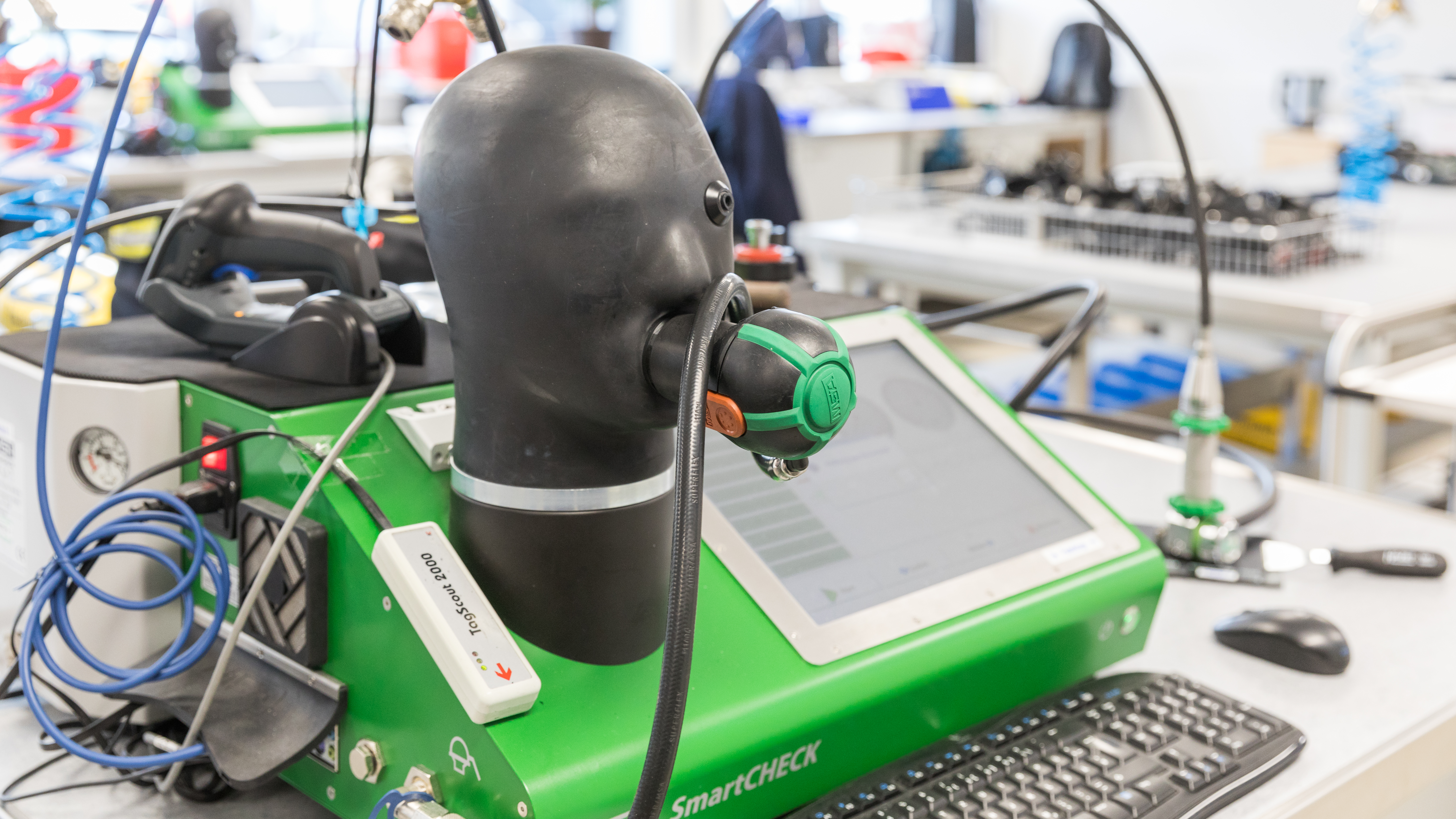 Feuerwehrzentrum Kalk - Atemschutz-Werkstatt